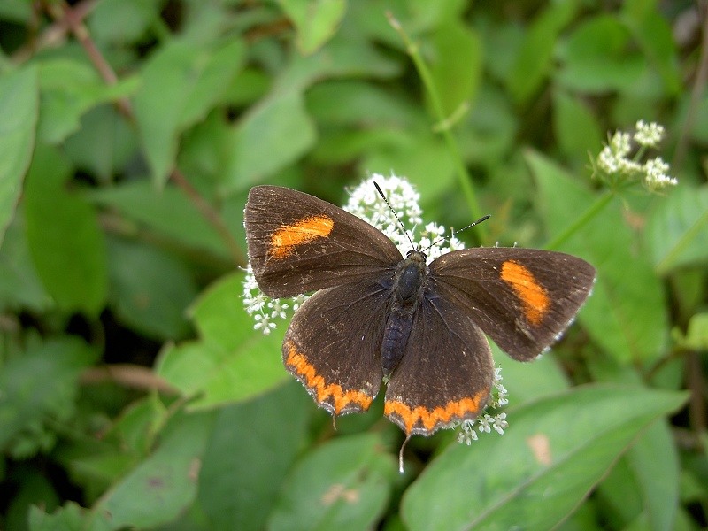 Heliophorus ila matsumurae（紅邊黃小灰蝶）, Female, Taipei, 2008.